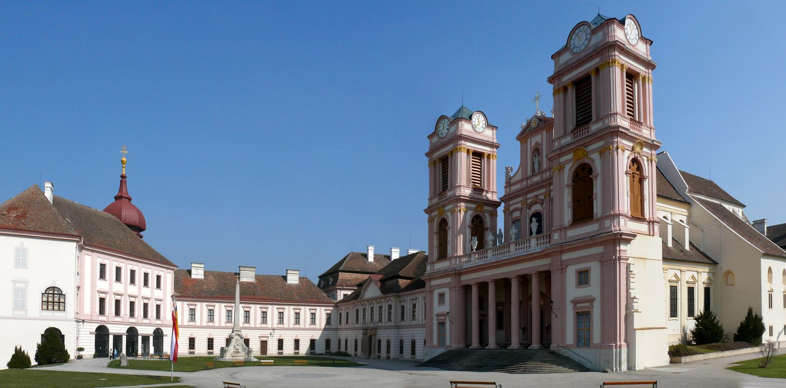 Stiftskirche und Kloster